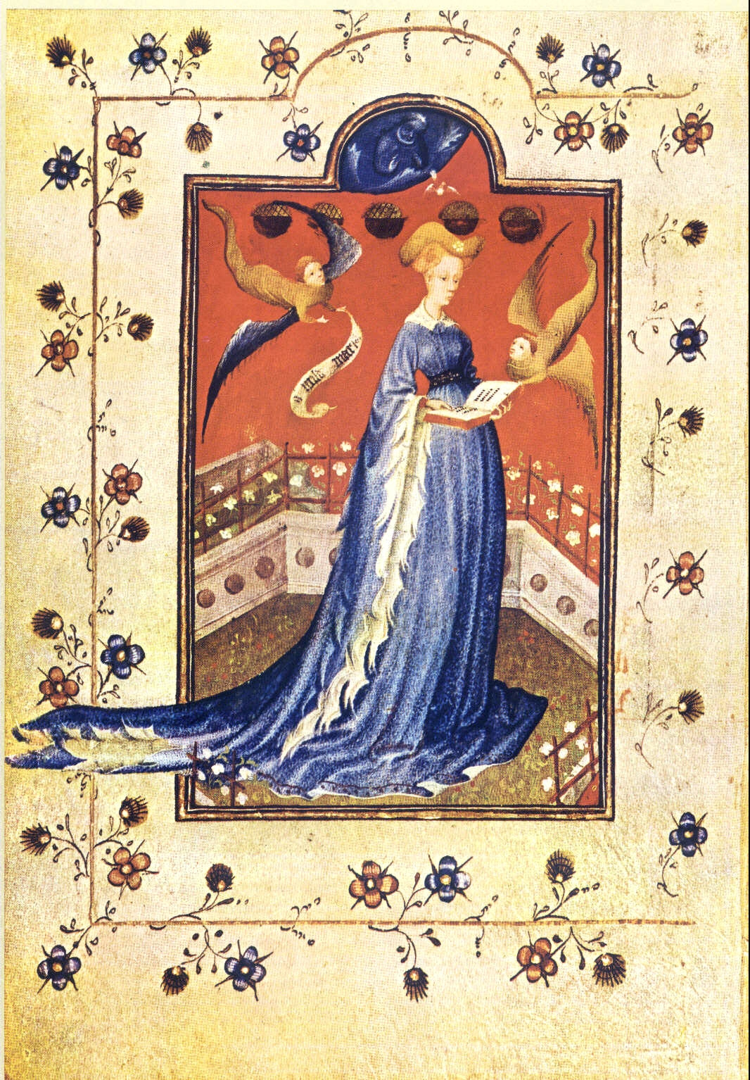 Verkündigung, Maria von Geldern in einem ummauerten Garten